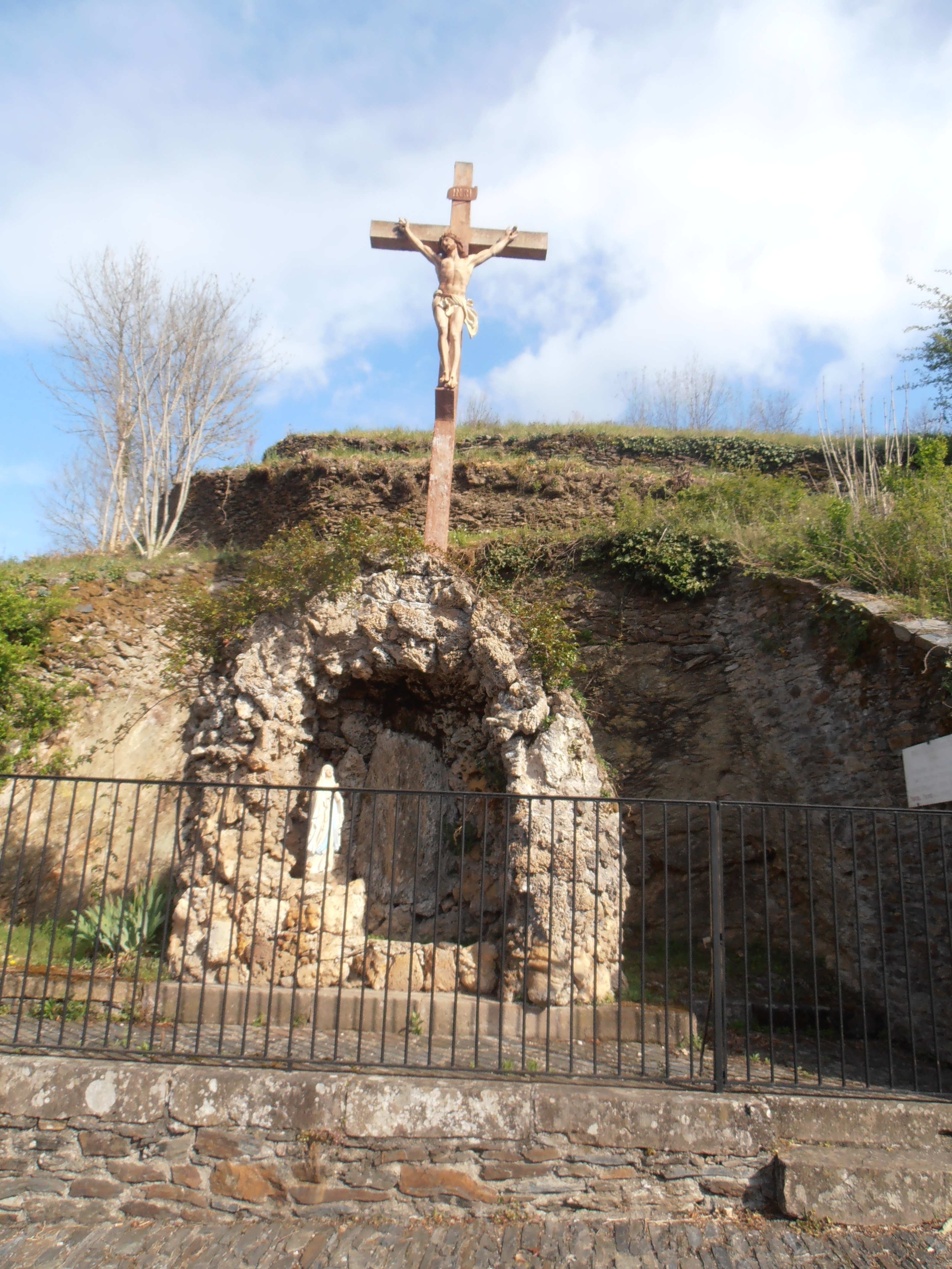 Sant Crist i capelleta de la Verge a l'entrada de Conques